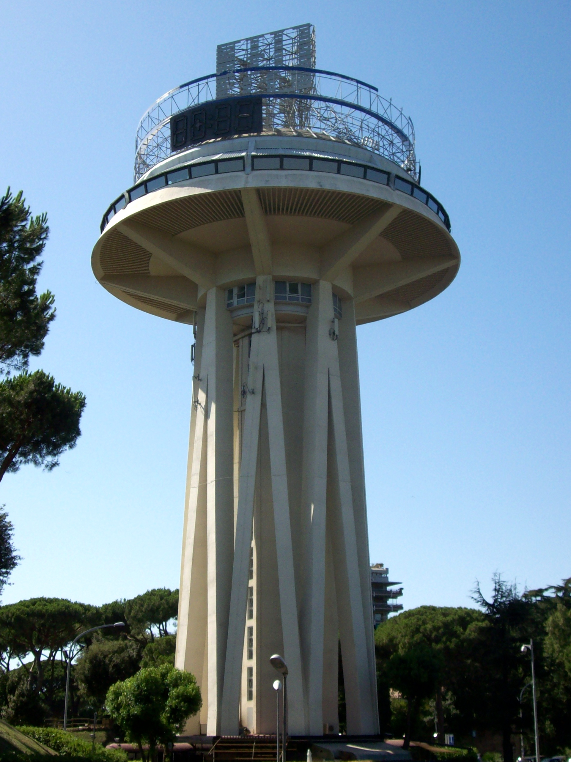 Il serbatoio idrico di Roma EUR, anche noto come il Fungo, a piazzale Pakistan. Alla sommità del manufatto si trova un ristorante panoramico.